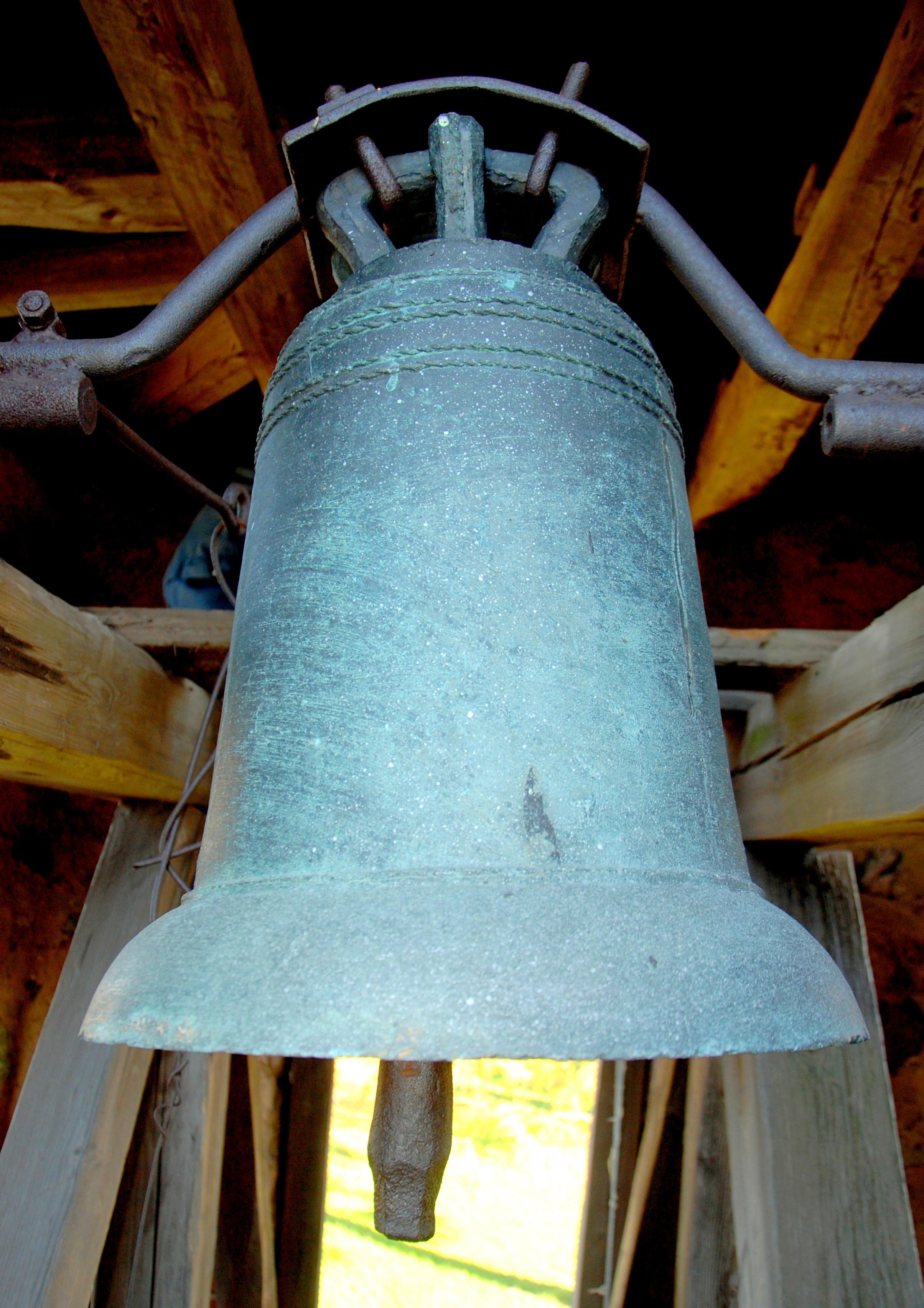 Kriaunų varpas XIV a. Meistras nežinomas